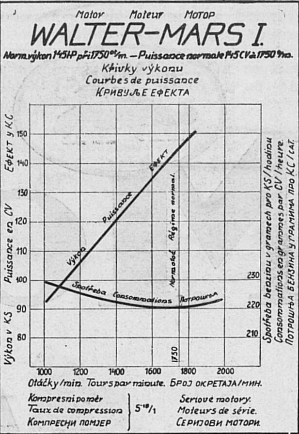 Walter Mars (charakteristiky)